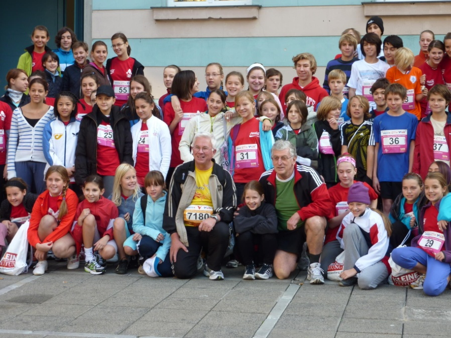 Bischof Lackner beim Graz-Marathon 2010 mit Schülerinnen und Schülern des Akademischen Gymnasiums Graz am 10. Oktober 2010